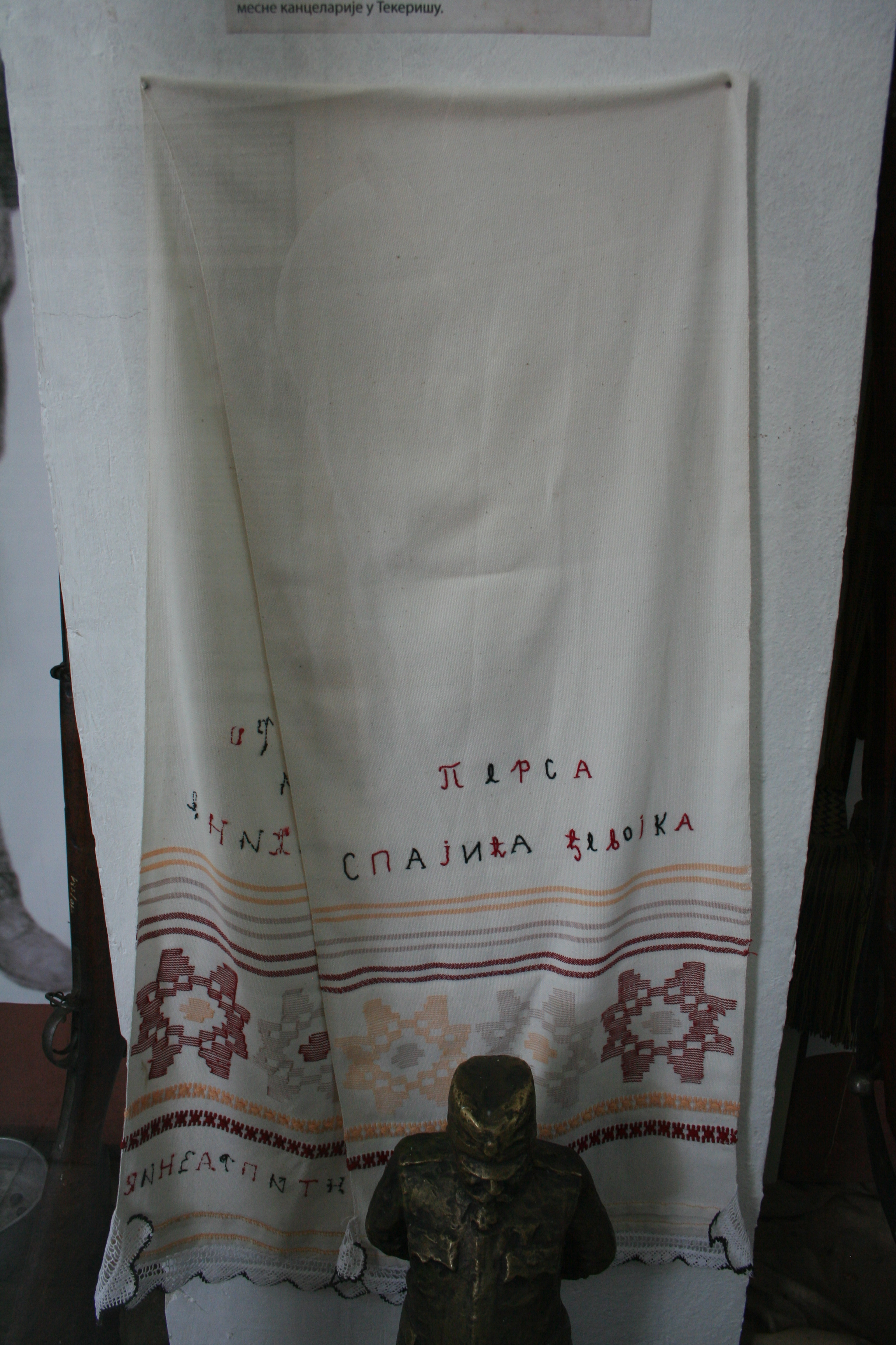 Spomen-kosturnica na Ceru